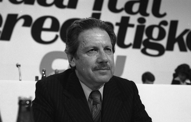 26. Bundesparteitag der CDU in der Friedrich-Ebert-Halle in Ludwigshafen 23.-25.10.1978